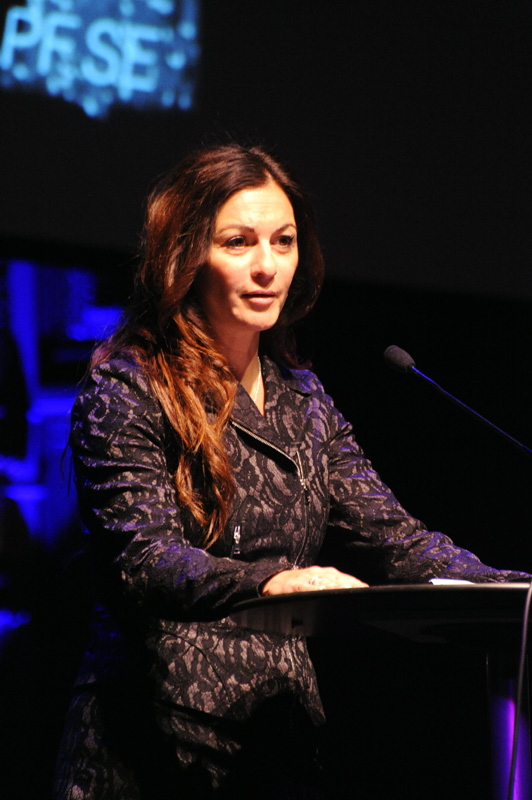 Elisabeth Massi Fritz at Fadimedagarna 2014, Berns Salonger, Stockholm, Sweden.